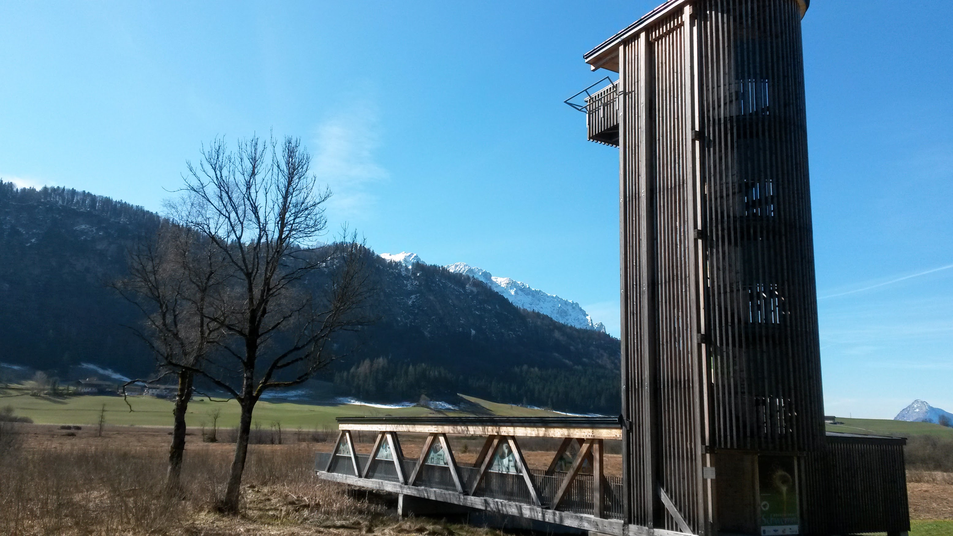 Der Aussichtsturm über der Schwemm, Tirols größter Moorlandschaft bei Walchsee im Kaiserwinkl